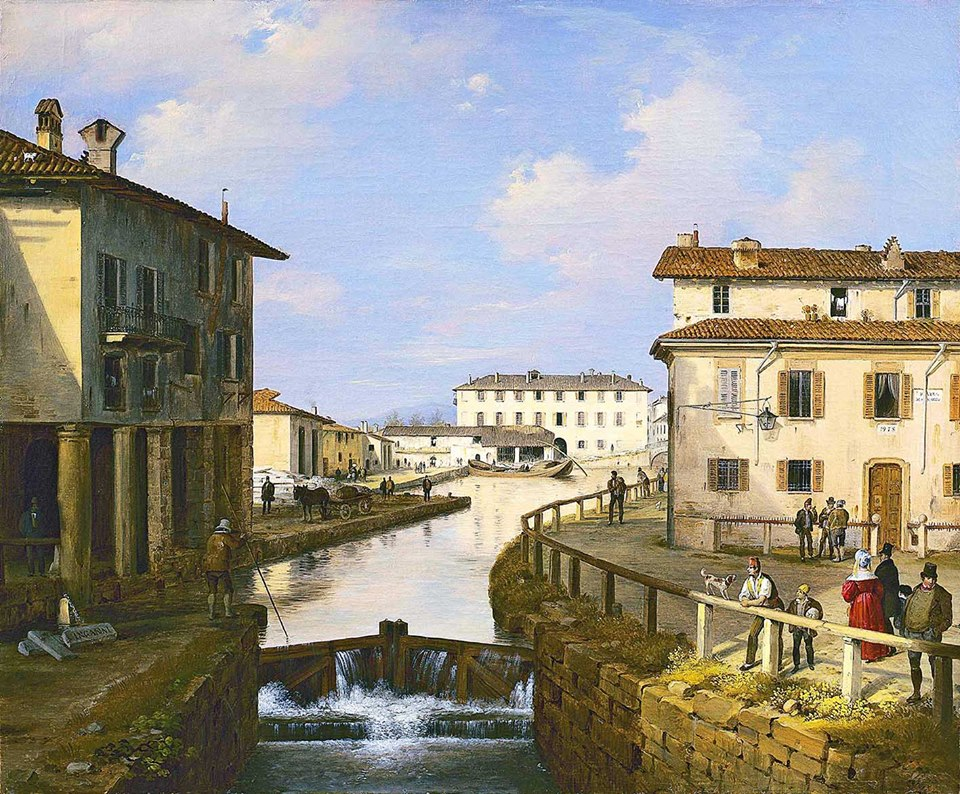 Veduta del Naviglio di San Marco, 1835